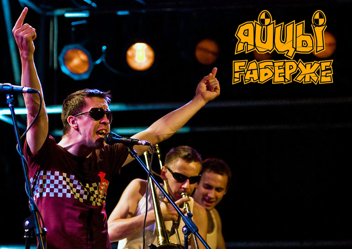 концерт группы Яйцы Фаберже